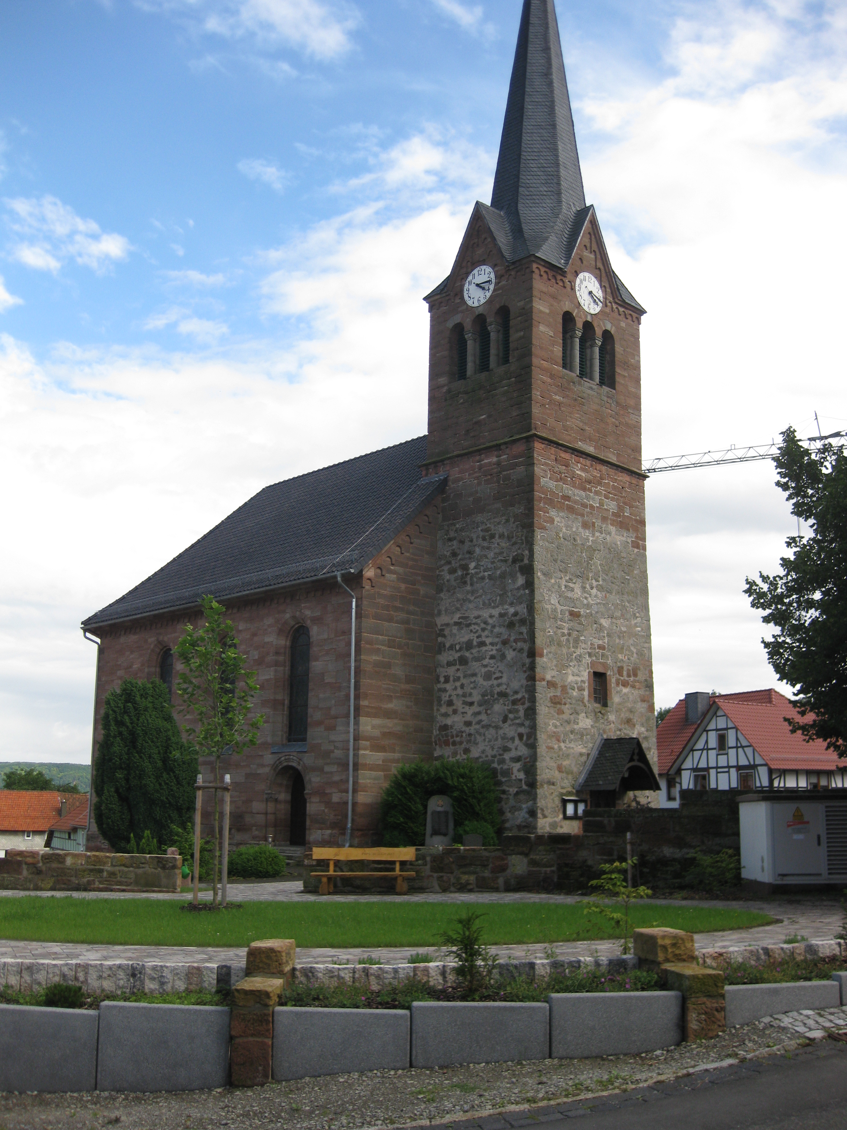 Die Kirche in Krombach